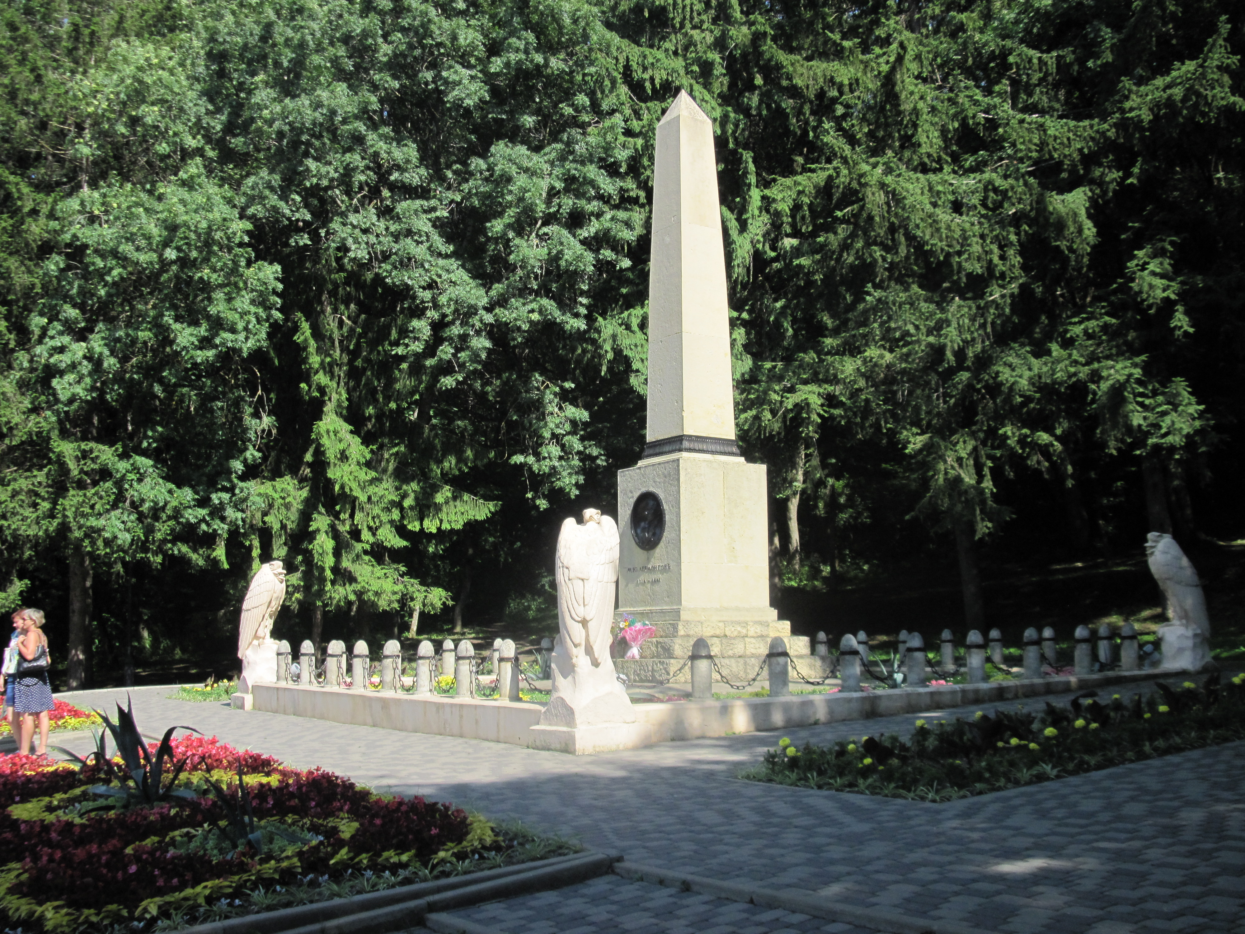 Место дуэли Лермонтова